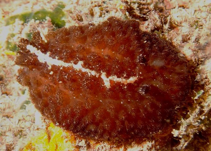 Atagema ornata, Reunión, 50 mm de largo, 3 m de profundidad